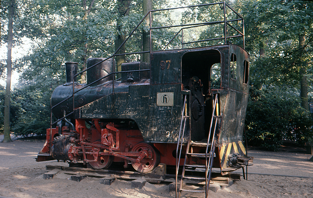 Hoesch Westfalenhütte 97 (9") (800 mm), Jung 10605/1950 (1974)